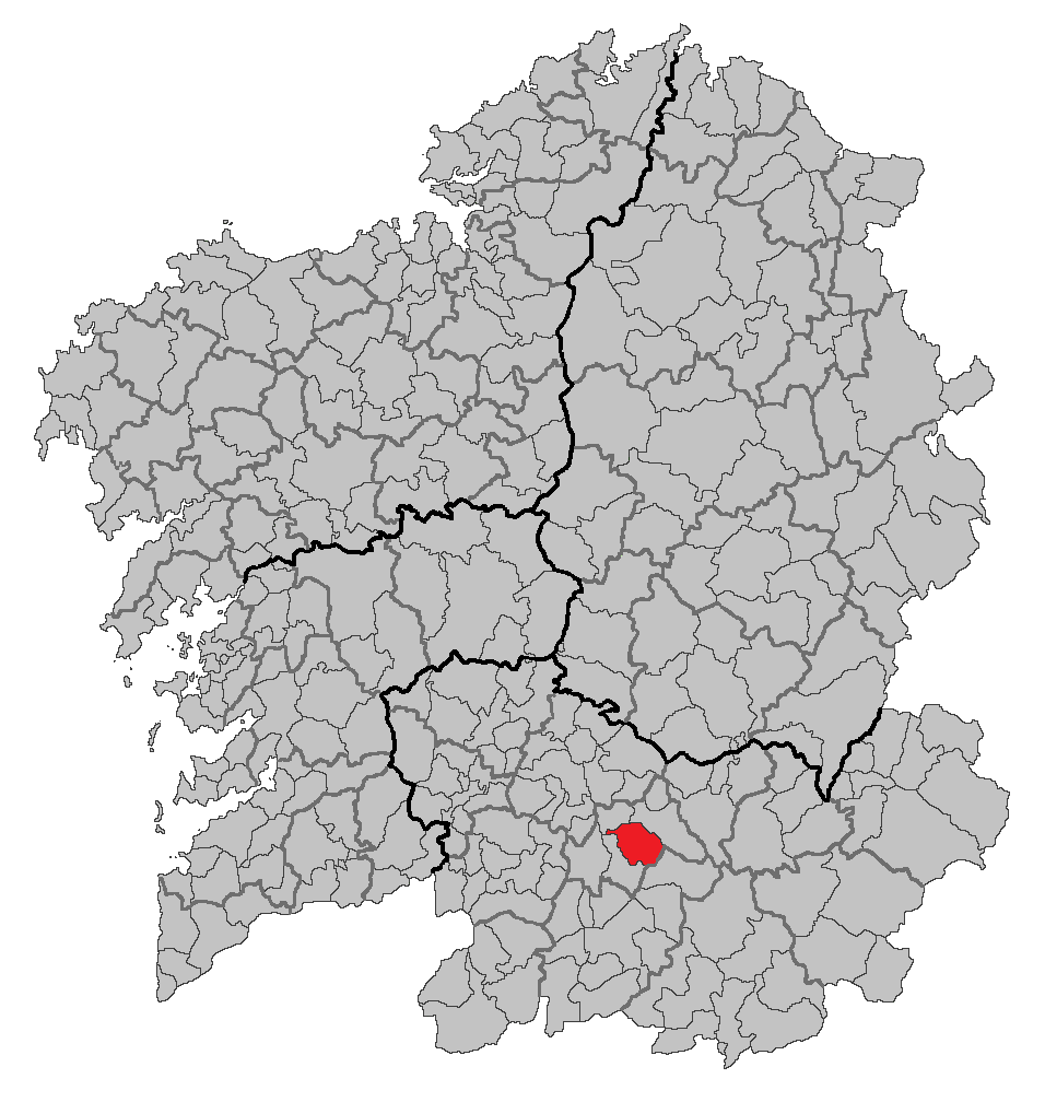 Mapa coa localización do concello de Baños de Molgas.